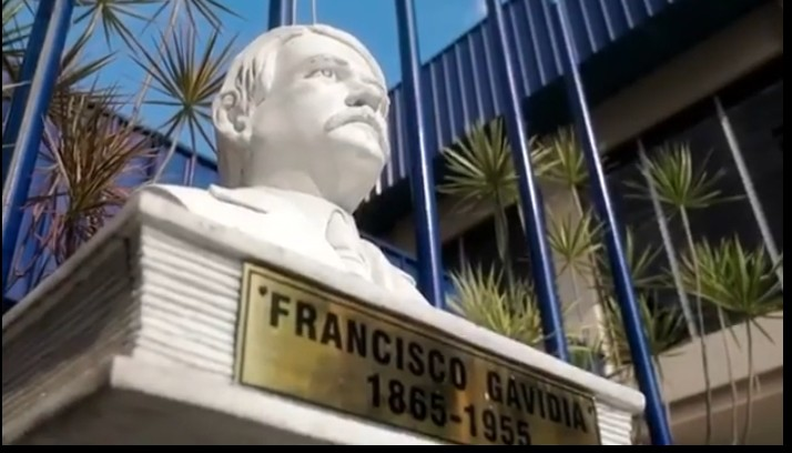 busto de el maestro francisco gavidia. situada en la La Universidad Francisco Gavidia (UFG) de El Salvador, es una de las principales universidades del país, por su número de estudiantes y enseñanza académica